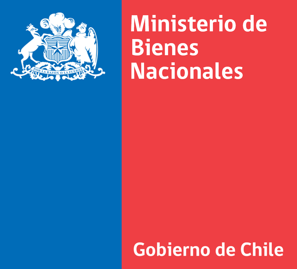 Logo del Ministerio de Bienes Nacionales.